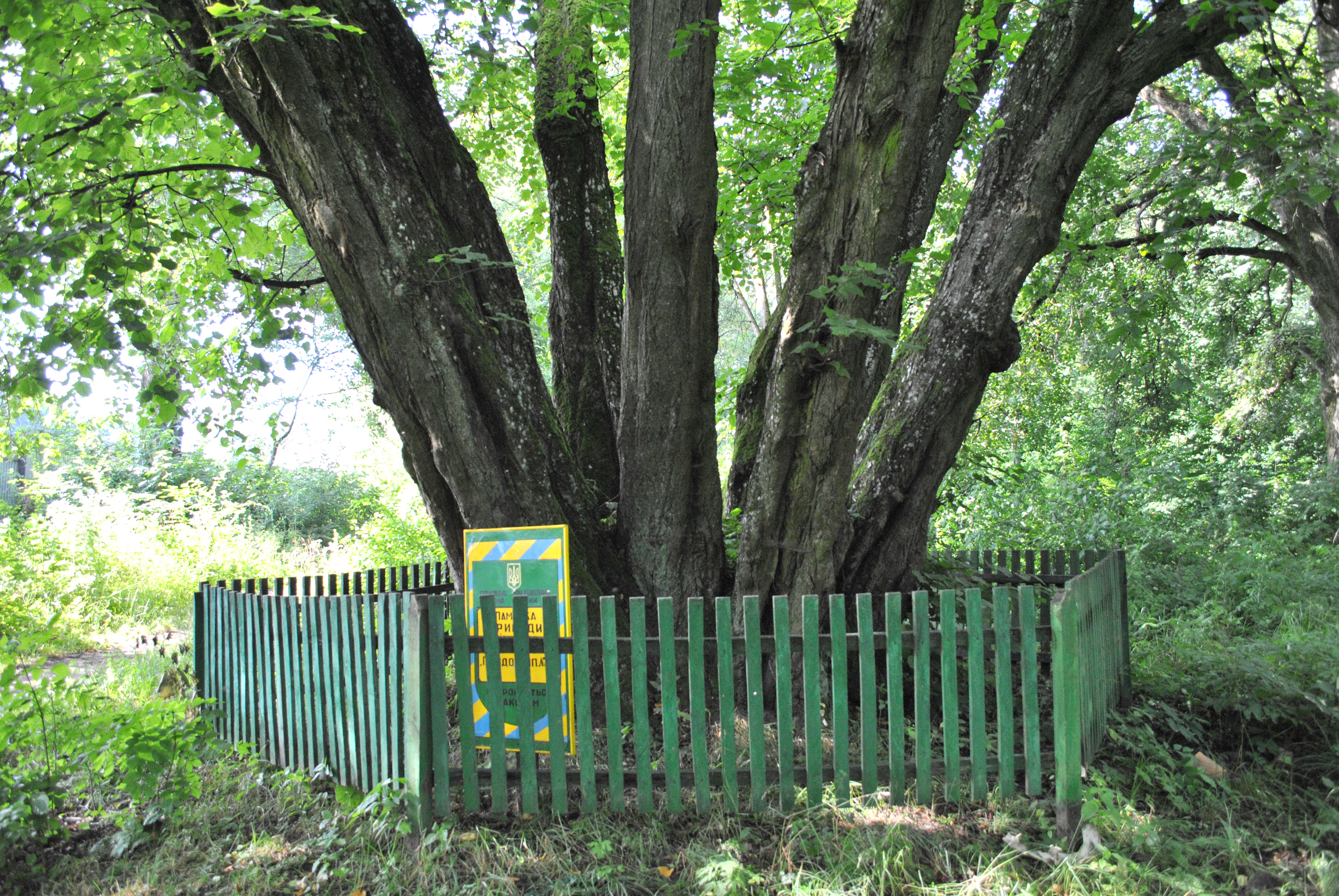 «Гніздо лип № 1» біля садиби Бучацької районної ветеринарної лікарні, м. Бучач, вул. Степана Бандери.